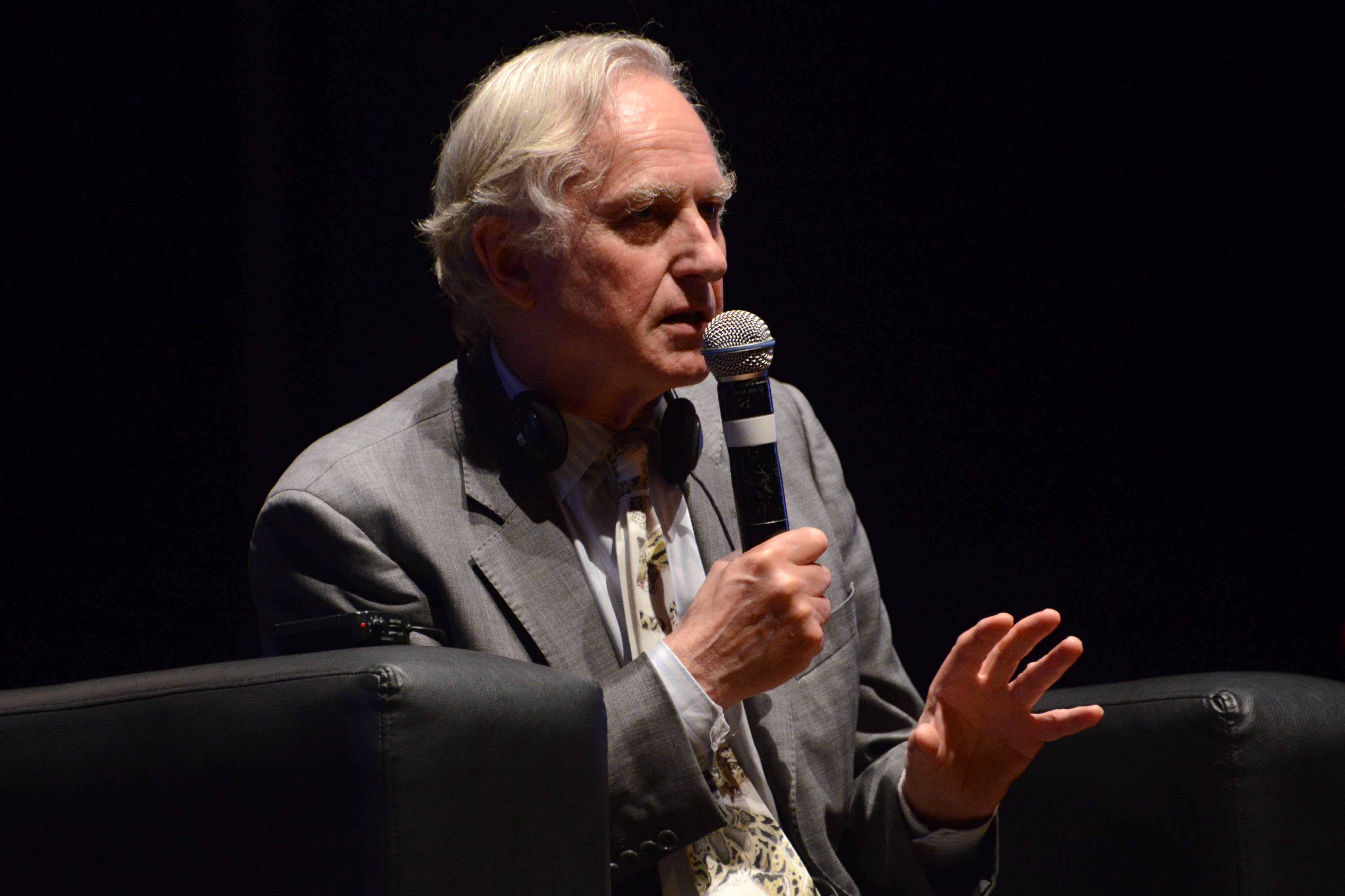 Richard Dawkins no Fronteiras do Pensamento Porto Alegre Convidado: Richard Dawkins, biólogo britânico Data: 25 de maio 2015 Local: Auditório Araújo Vianna – Porto Alegre Crédito: Luiz Munhoz